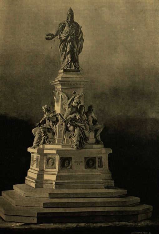 Az aradi vértanúk emlékszobra, Huszár Adolf kis mintája. Vasárnapi Ujság fotó. 1889. október 6. 02